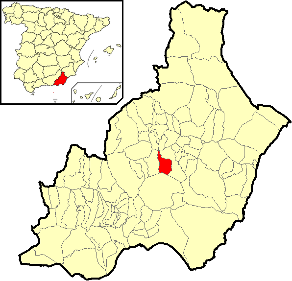 Situación del término municipal de Senés respecto a la provincia de Almería, en España.